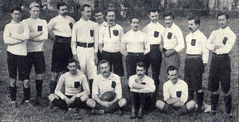 Le Stade bordelais, champion de France en 1899.